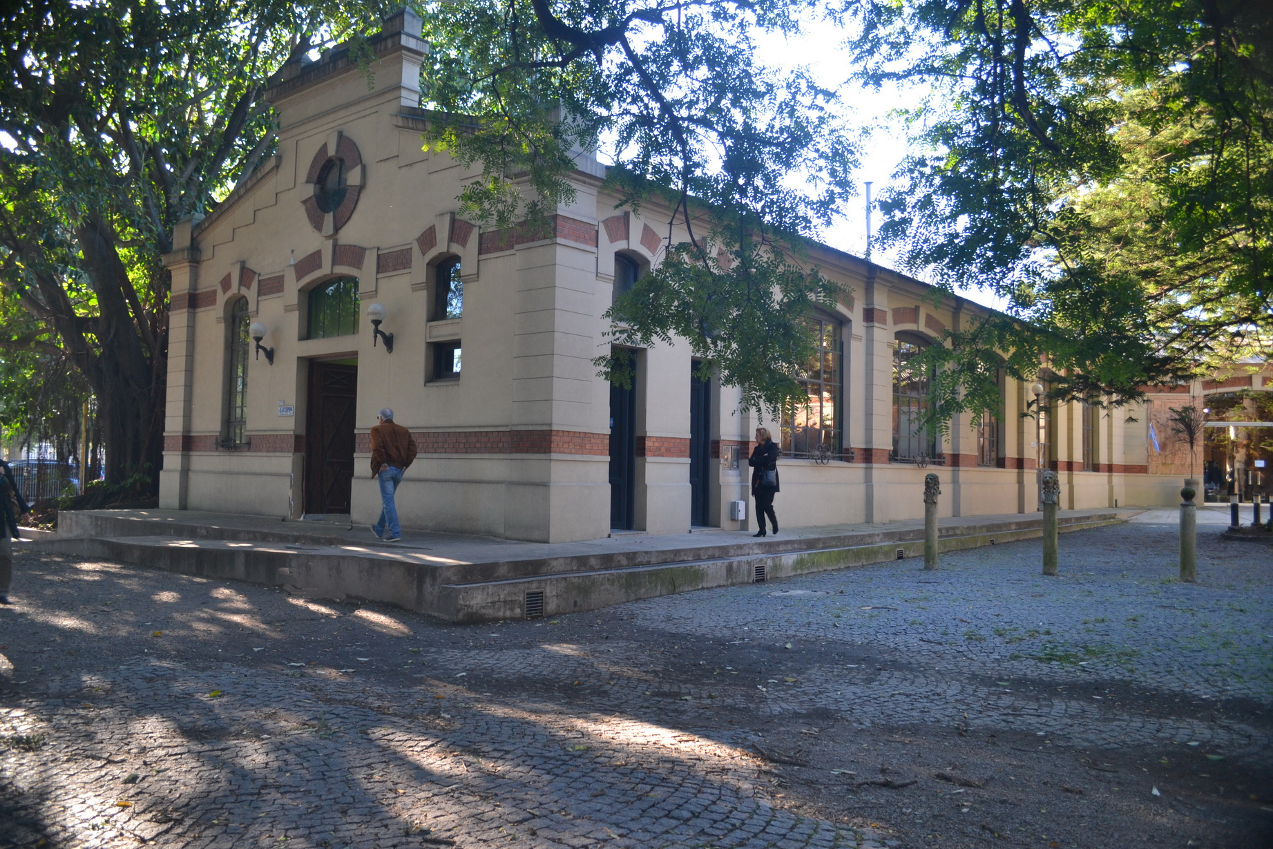 Escuela Superior de Bellas Artes Ernesto De La Cárcova